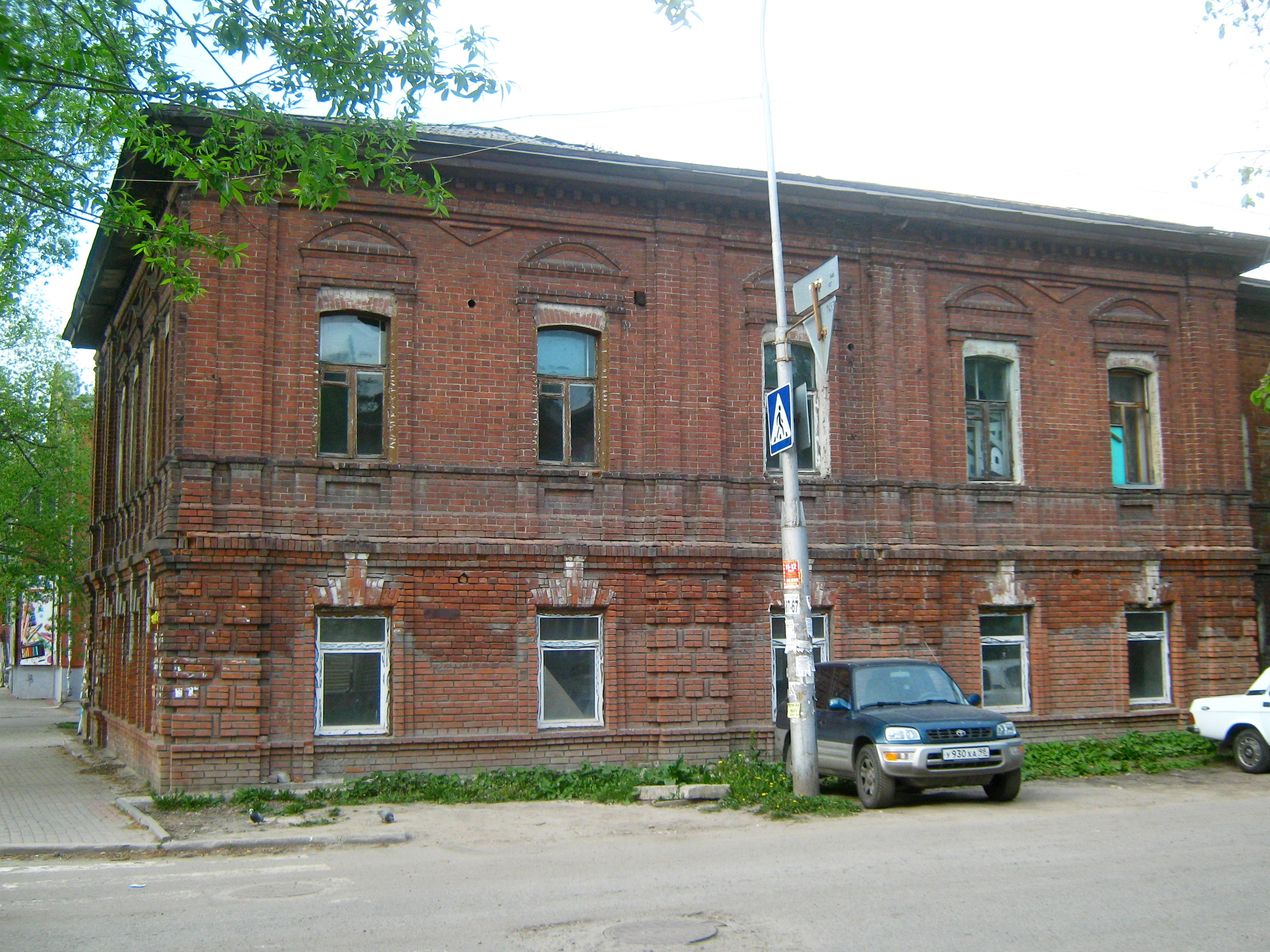 Гагарина 14 - Беленца 18, Томск